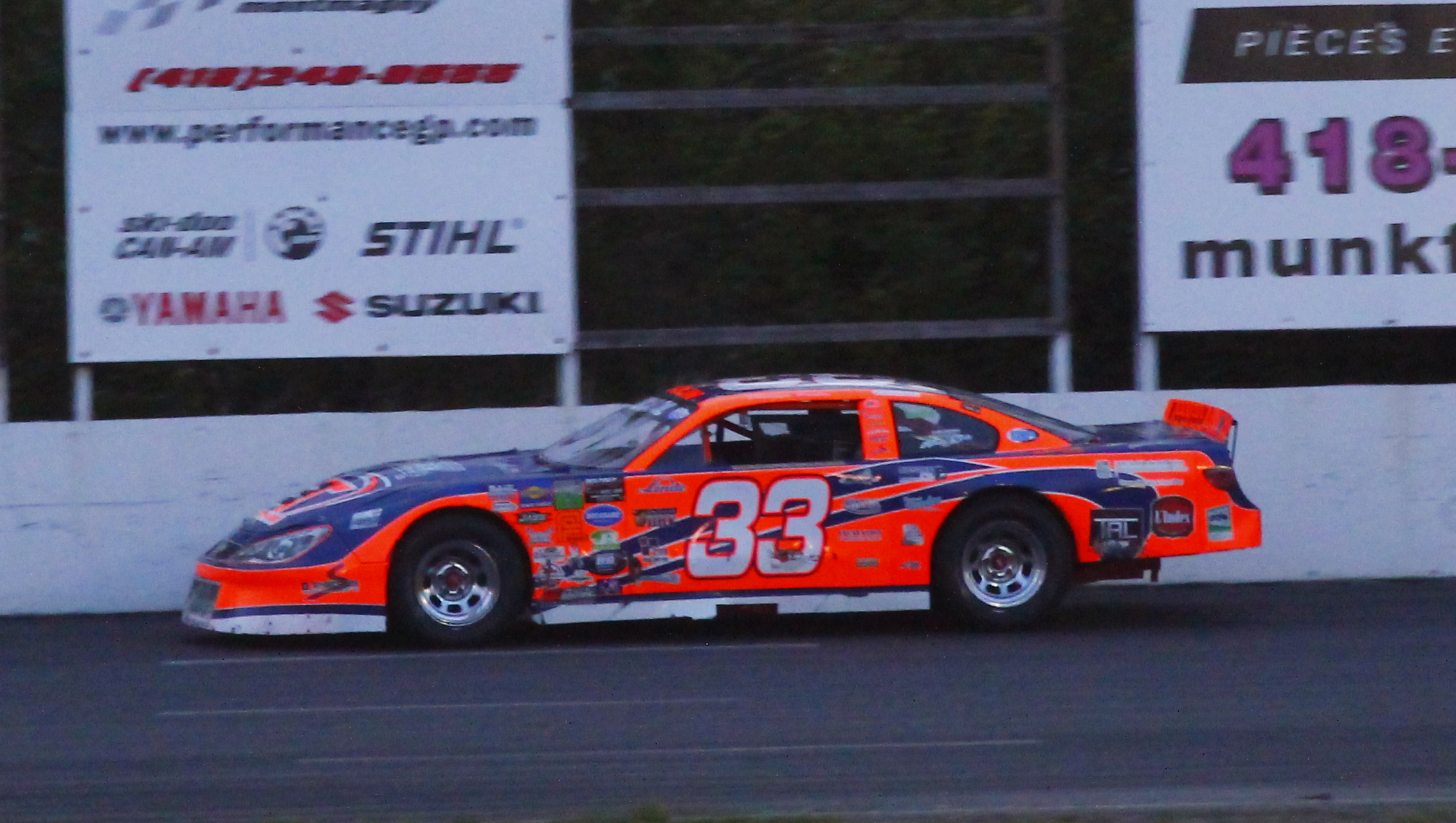 Philippe Poulin - Série Sportsman Québec - Autodrome Montmagny - 27 juin 2015 (photo Paul-Émile Poulin-Jacques)